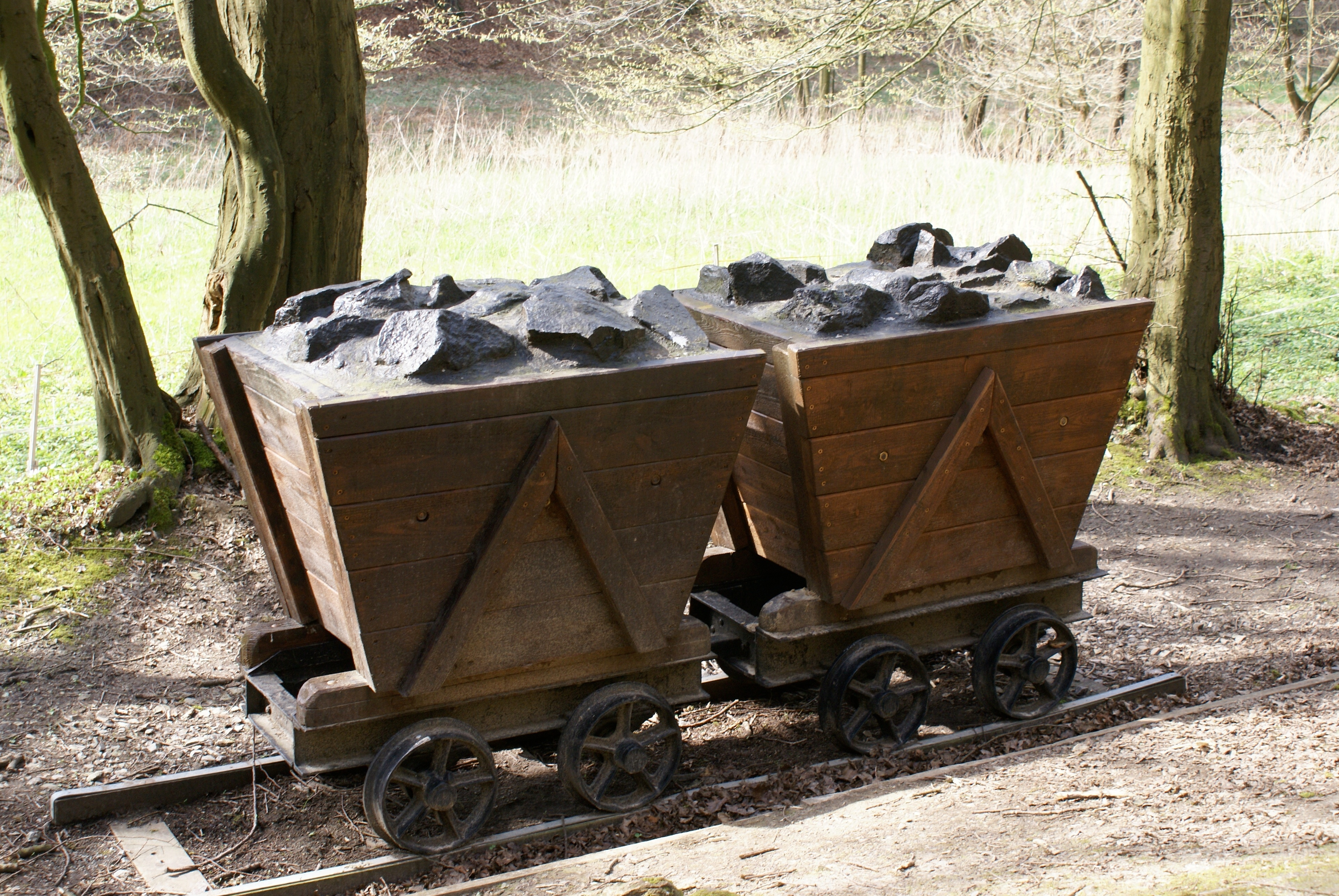 Loren (Nachbau) der Muttentalbahn auf der historischen Trasse, Bergbaurundweg Muttental, Witten